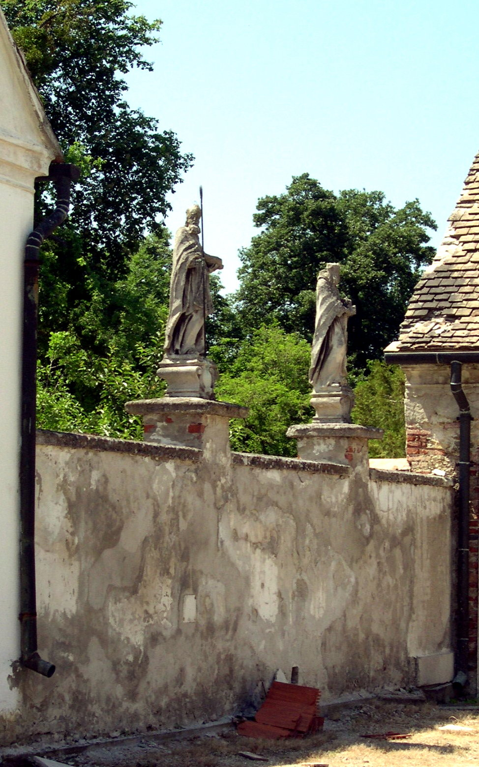 Részlet a majki kolostoregyüttesből